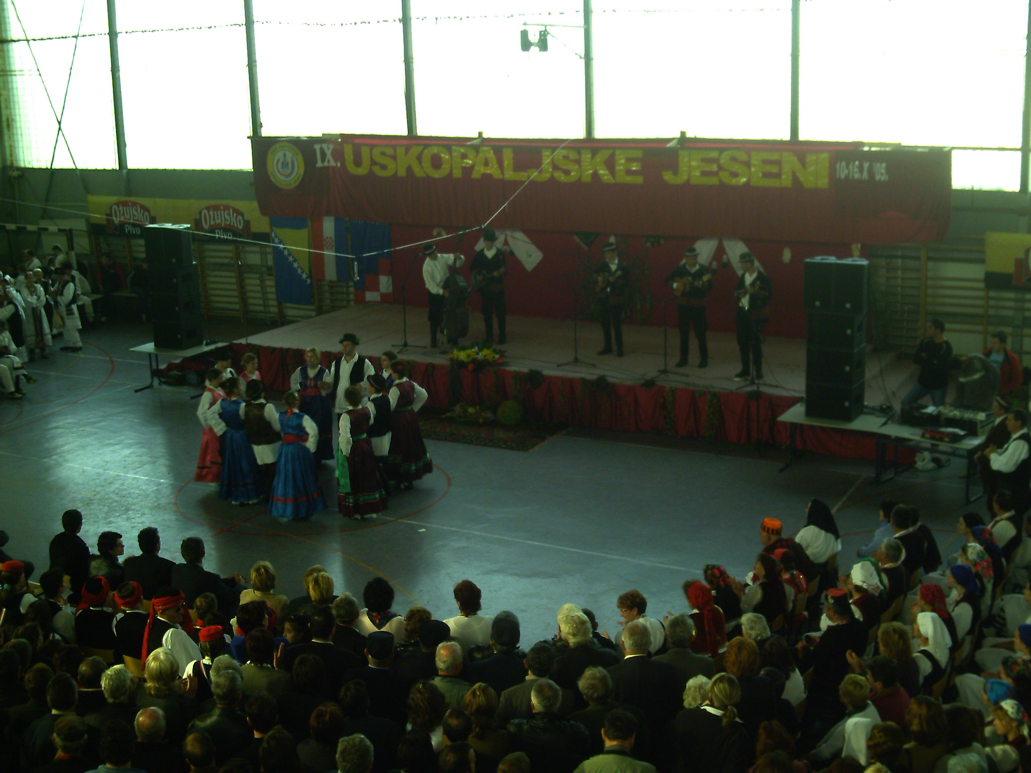 Folklore